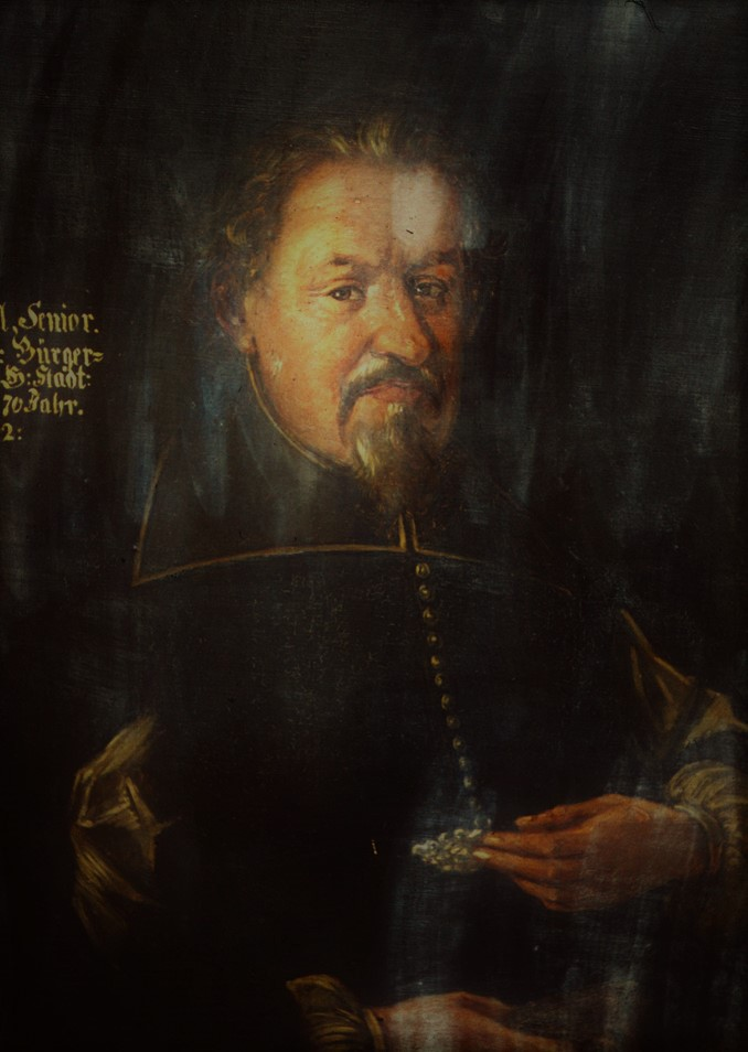 Johann Löbel, Bildnis auf verzinntem Eisenblech, (Stadtkirche Johanngeorgenstadt)